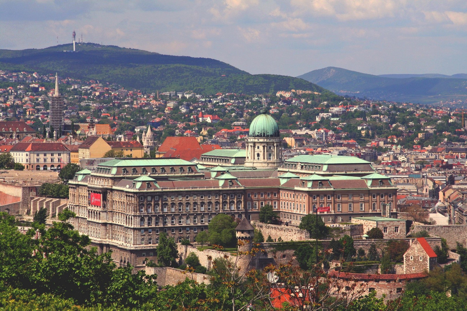 A Királyi palota déli része)